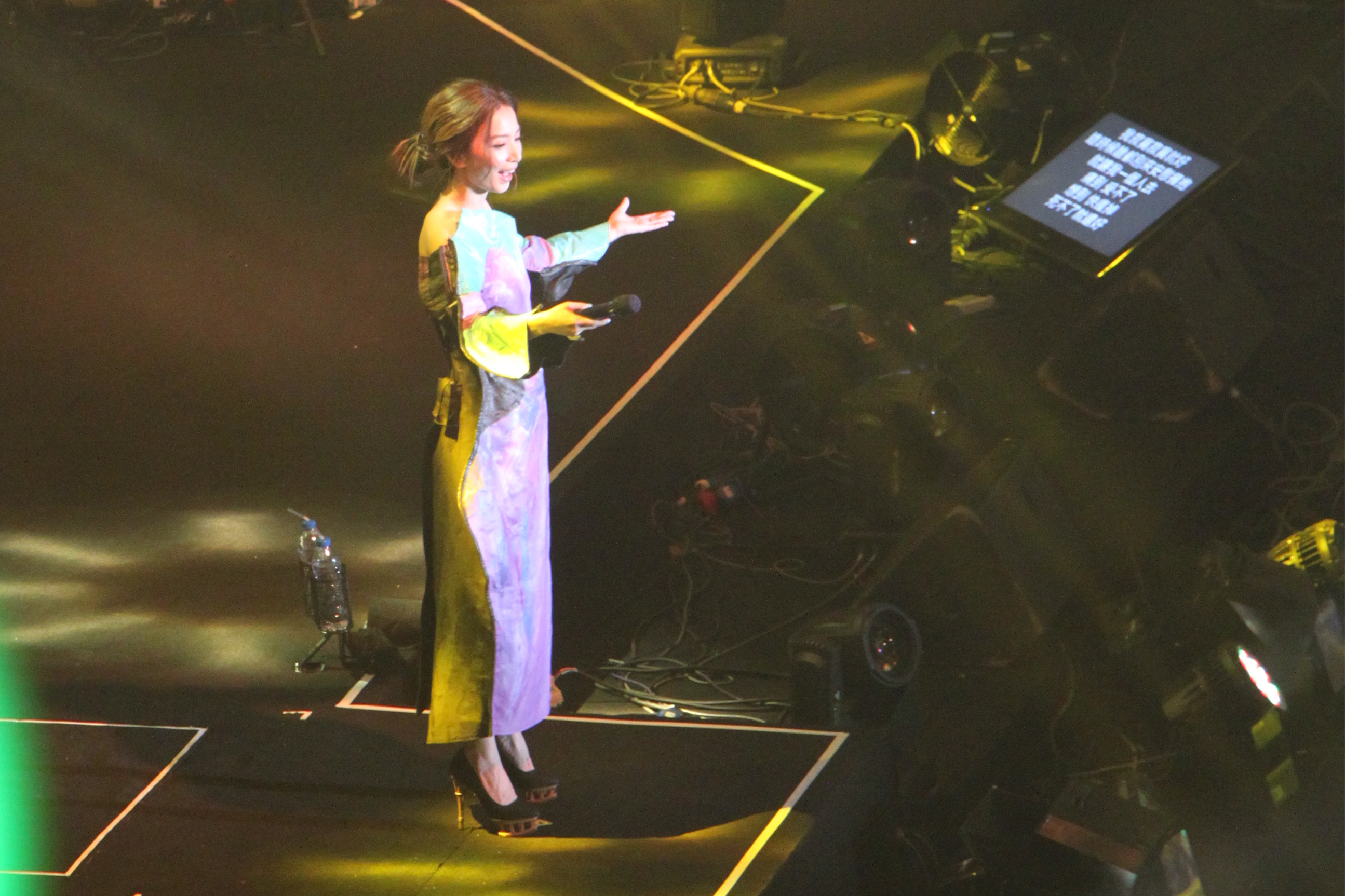 中文（中国大陆）: 2016年9月3日，如果世界巡回演唱会武汉站现场。